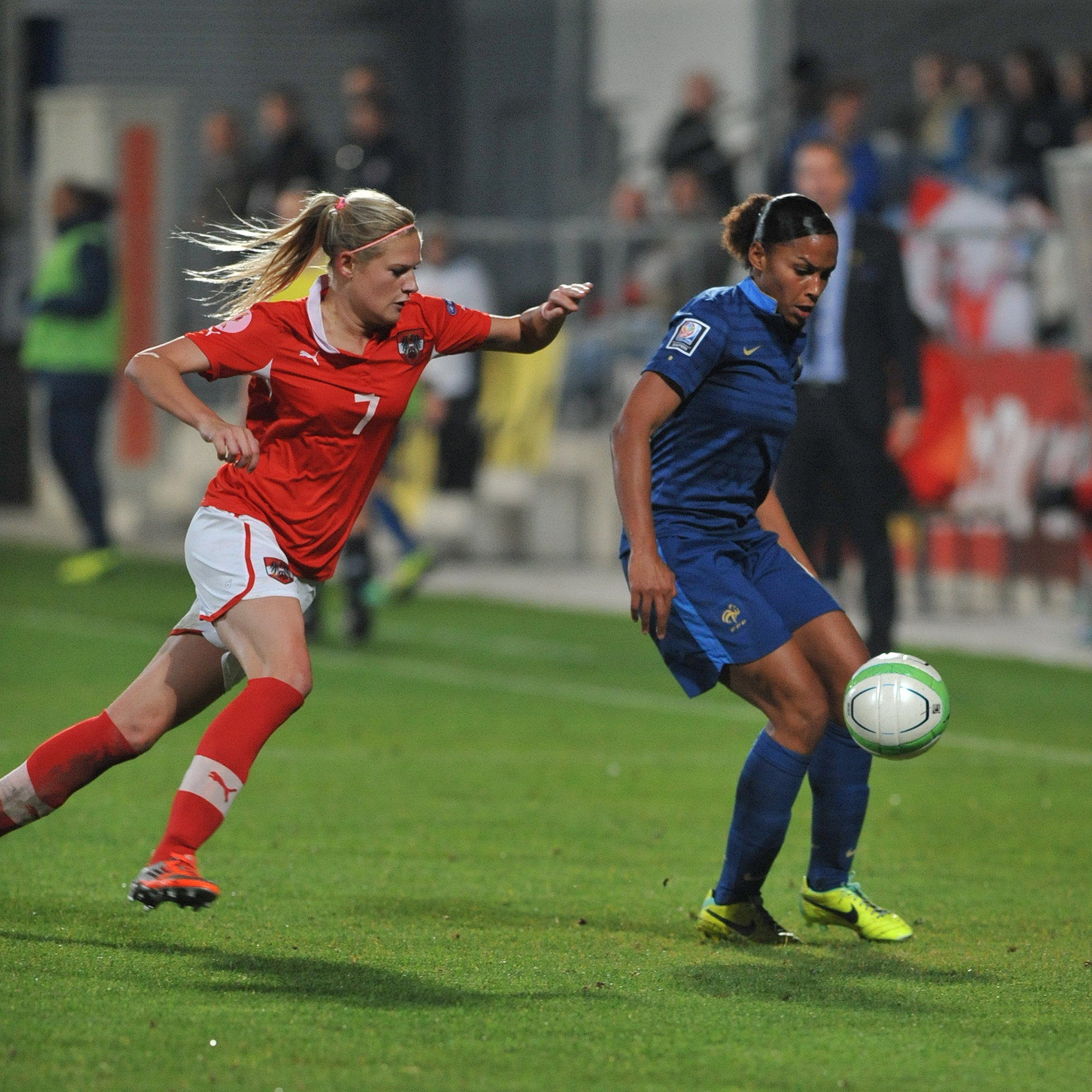 FIFA Women's World Cup 2015 Qualiying Round Österreich - Frankreich am 31. Oktober 2013 in Ritzing: Carina Wenninger